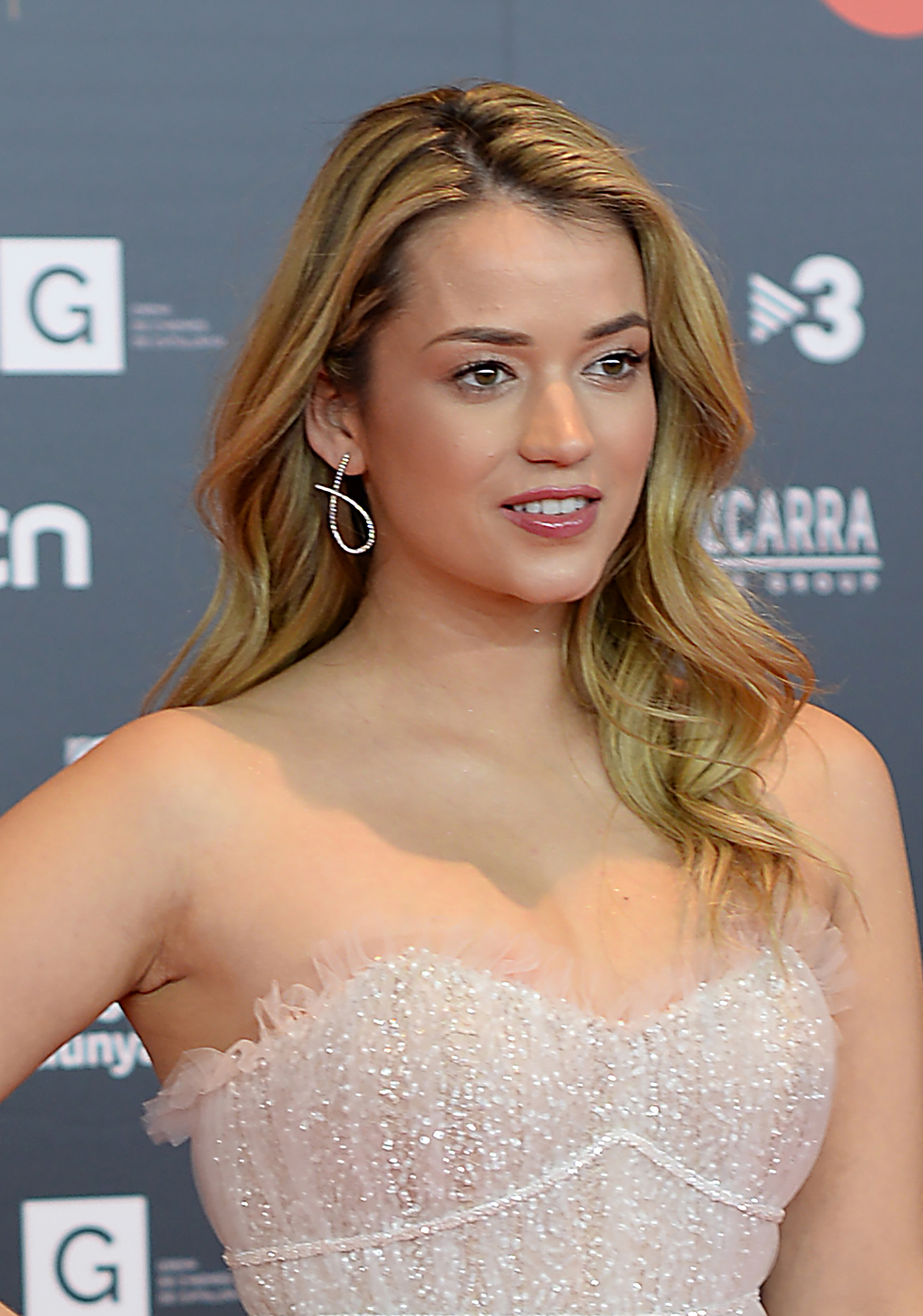 Júlia Creus, actriu, XII Premis Gaudí (2020)